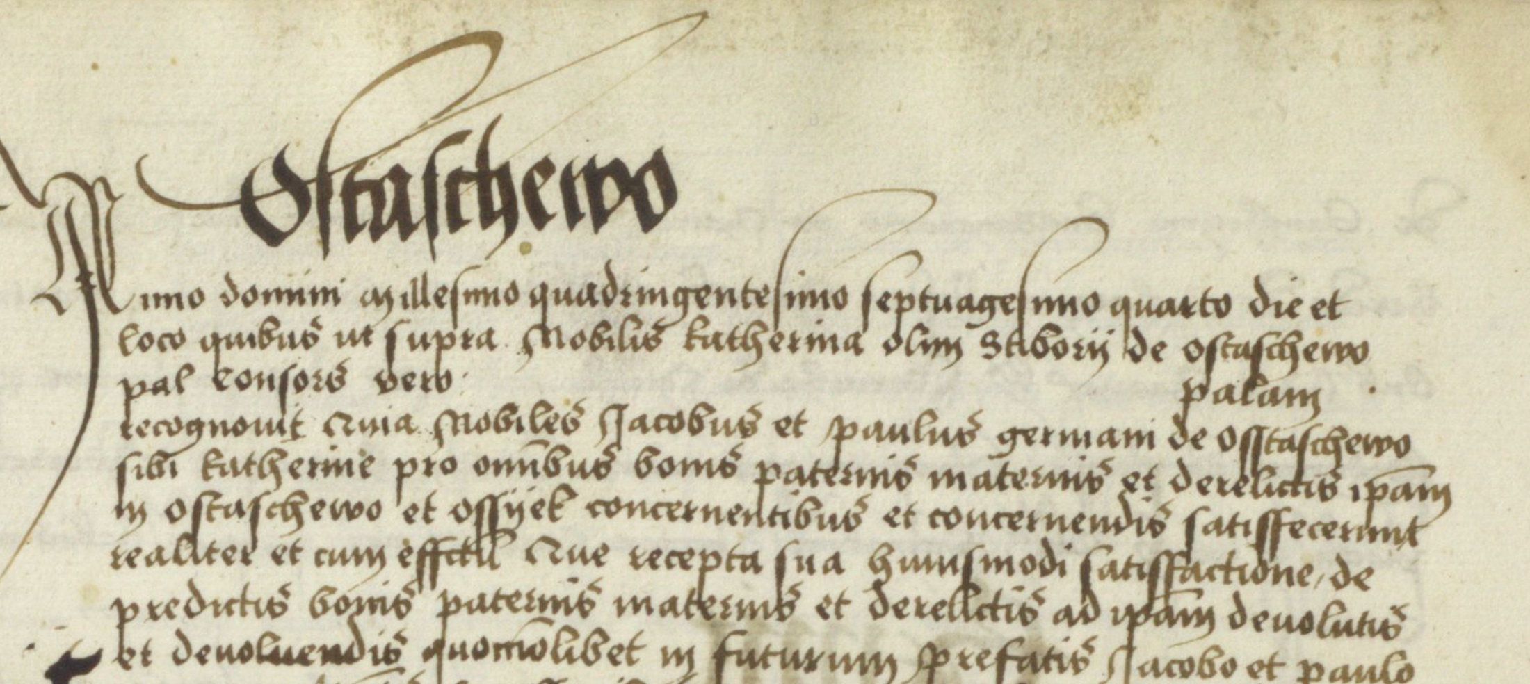 Archiwum Główne Akt Dawnych w Warszawie, Metryka Koronna, Księgi wpisów kancelarii mazowieckiej (Metryka Mazowiecka) MK 6, k. 58v.